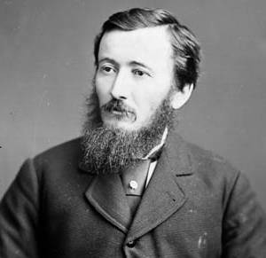 Oscar Fulton, M.P., (Stormont, Ont.)